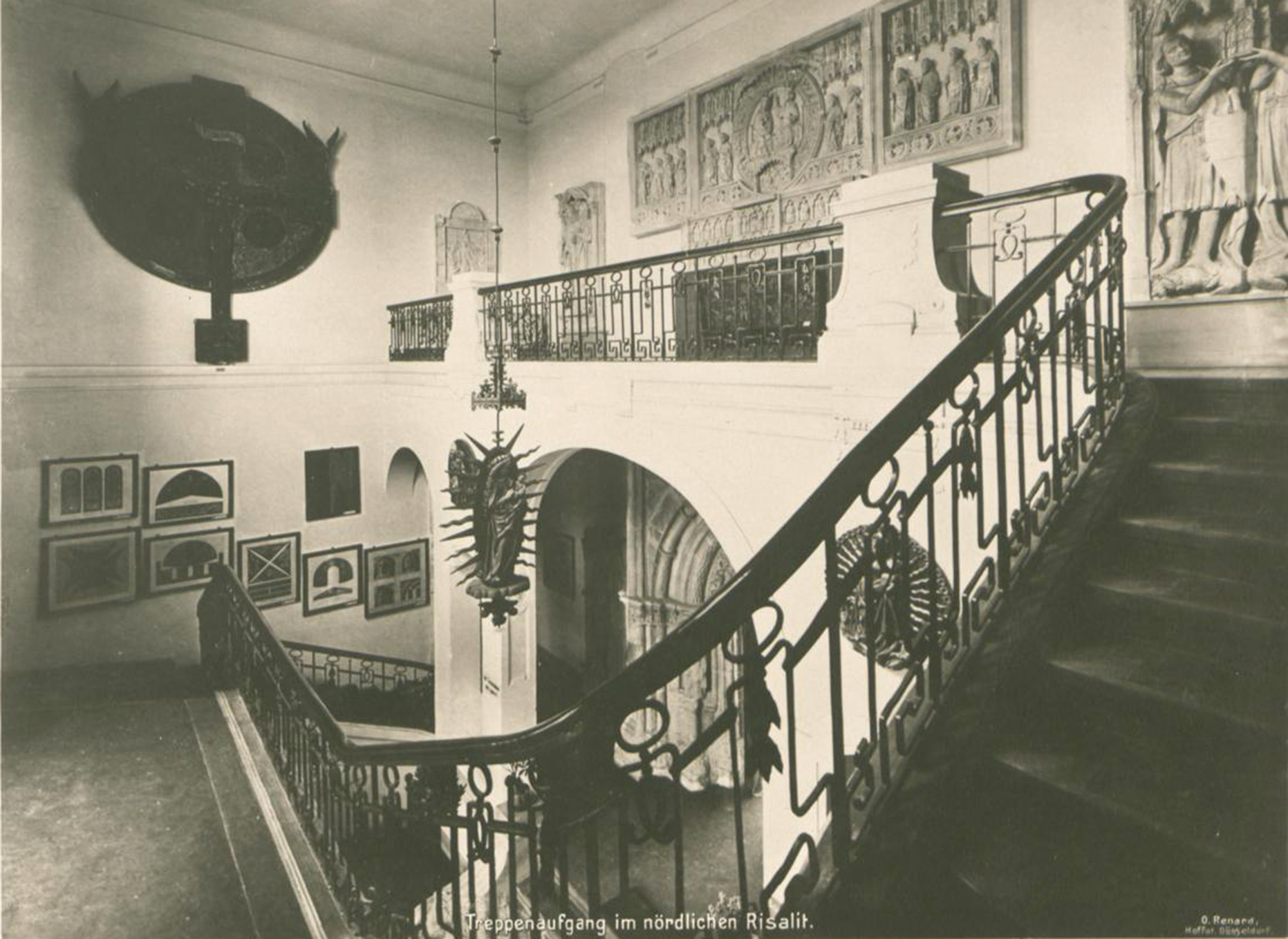 Kunstpalast, der Treppenaufgang im nördlichen Risalit, Foto Otto Renard, 1902